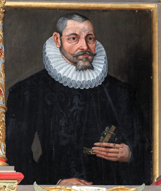 Porträt der Burger Bürgermeisters David Gloxin (1568-1646) von dessen Epitaph